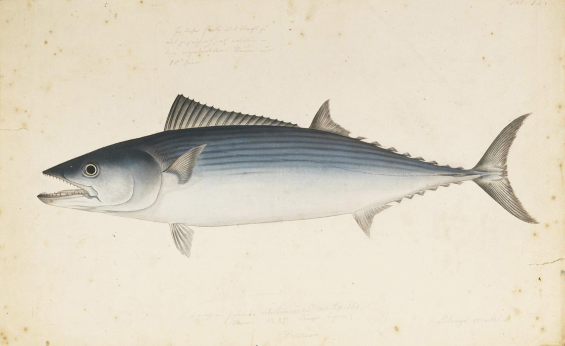 Sarda orientalis (Temminck and Schlegel)